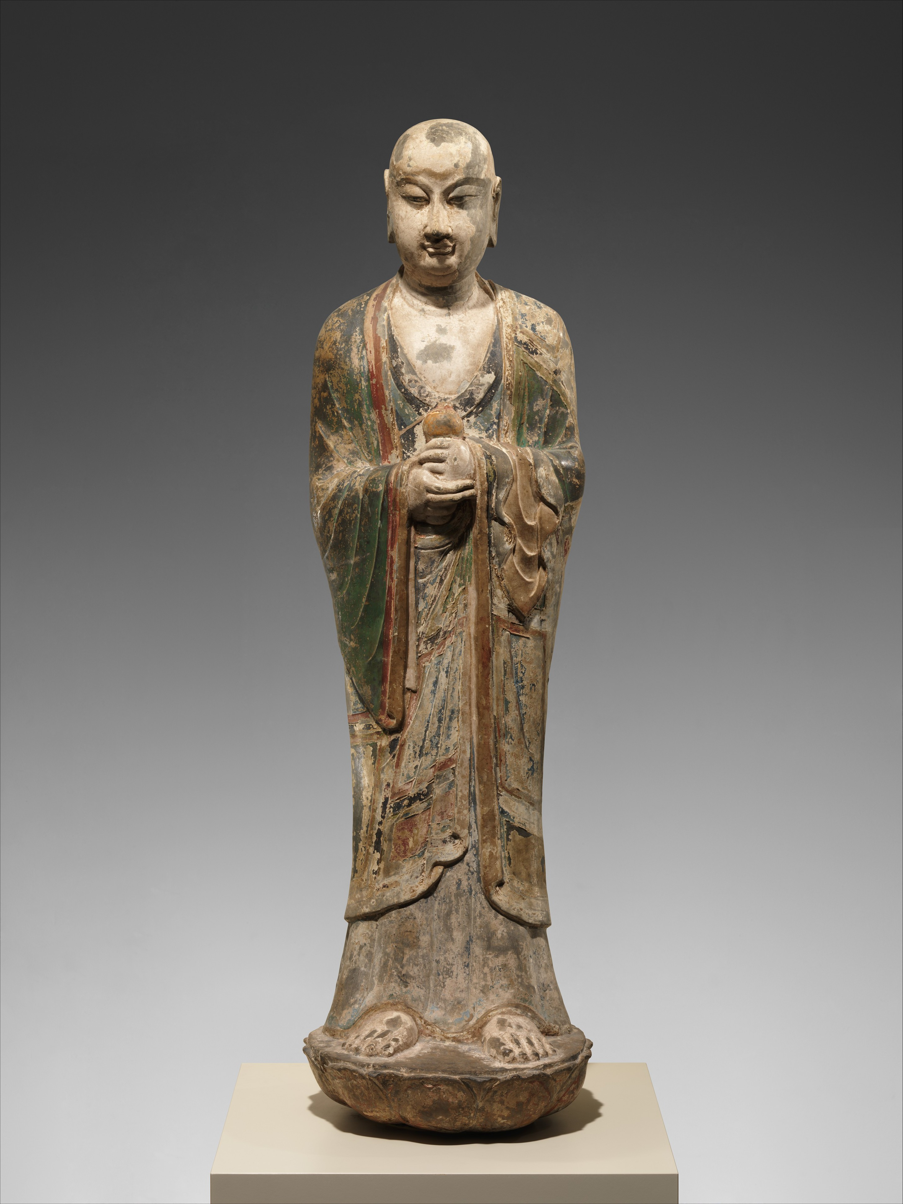 China; Figure; Sculpture